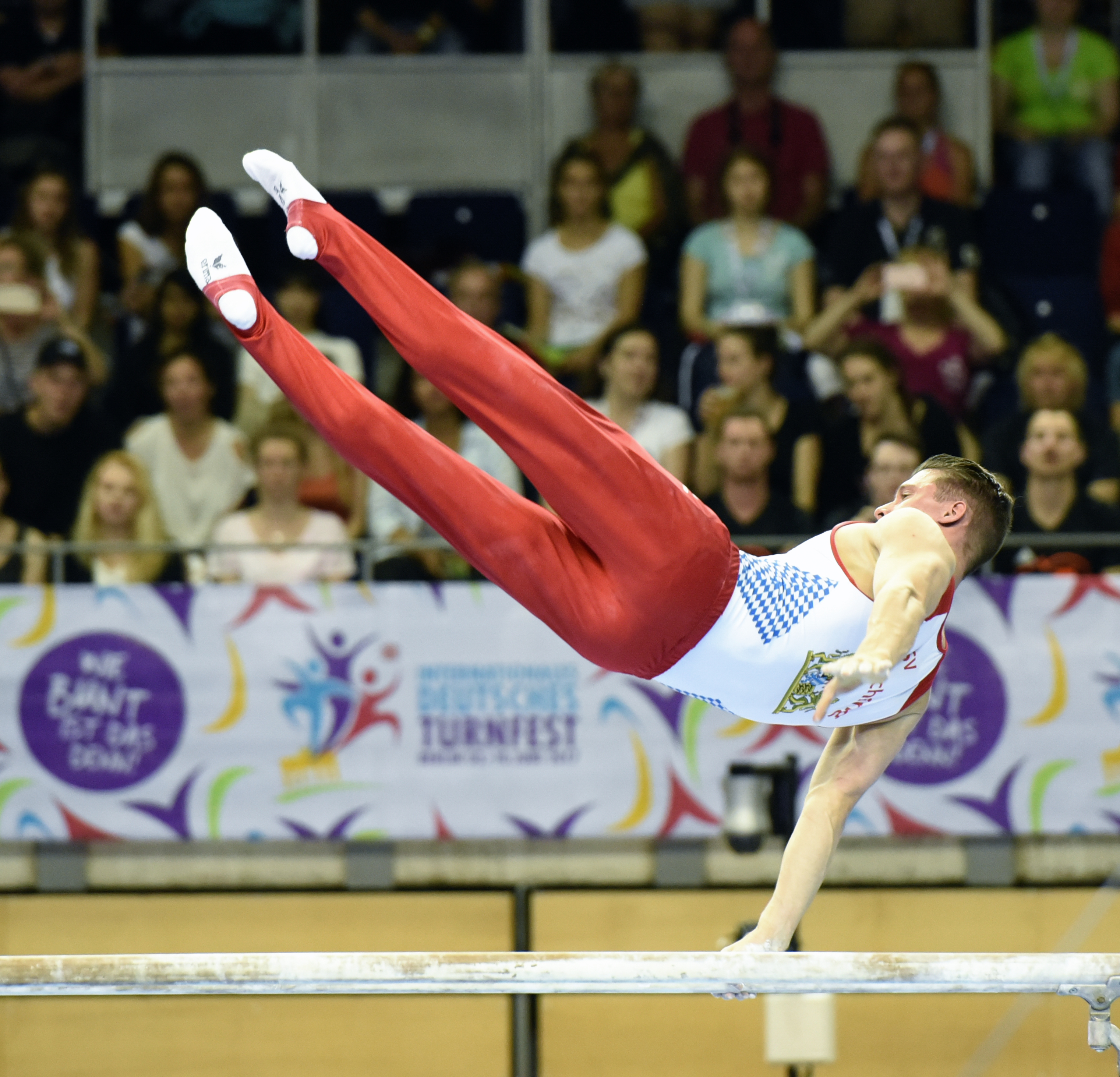 Deutsche Meisterschaften Gerätturnen Mehrkampf männlich Wettkampf beim Internationalen Deutschen Turnfest Berlin 2017. Abgebildet: Lukas Dauser.